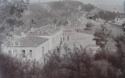 Български и турски пост на Деве баир.